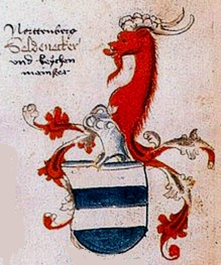 Ingeram-Codex der ehemaligen Bibliothek Cotta Dye von Seckendorff Dye Seldenecker [Norttenberg/und beychen/mainßer] Dye von hesch/pperg Dye von wenckeim (Wenkheim)